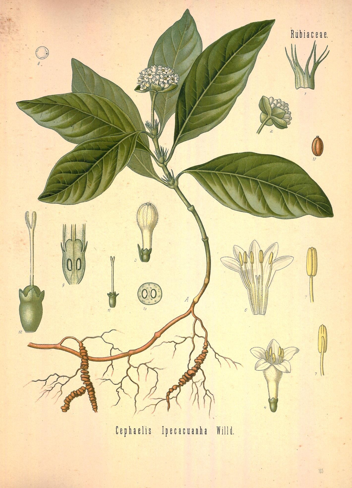 Brechwurzel. A blühende Pflanze in natürl. Grösse; 1 Nebenblatt, vergrössert; 2 Blüthenkopf von unten, natürl. Grösse; 3 Blüthenknospe, mit Blüthendeckblättchen, vergrössert; 4 Blüthe, desgl.; 6 aufgeschnittene und ausgebreitete Blüthe, desgl.; 7 Staubgefässe, desgl.; 8 Pollen, desgl.; 9 Fruchtknoten im Längsschnitt, desgl.; 10 derselbe im Querschnitt, desgl.; 11, 12 Stempel, schwächer und stärker vergrössert; 13 Früchtchen, desgl.